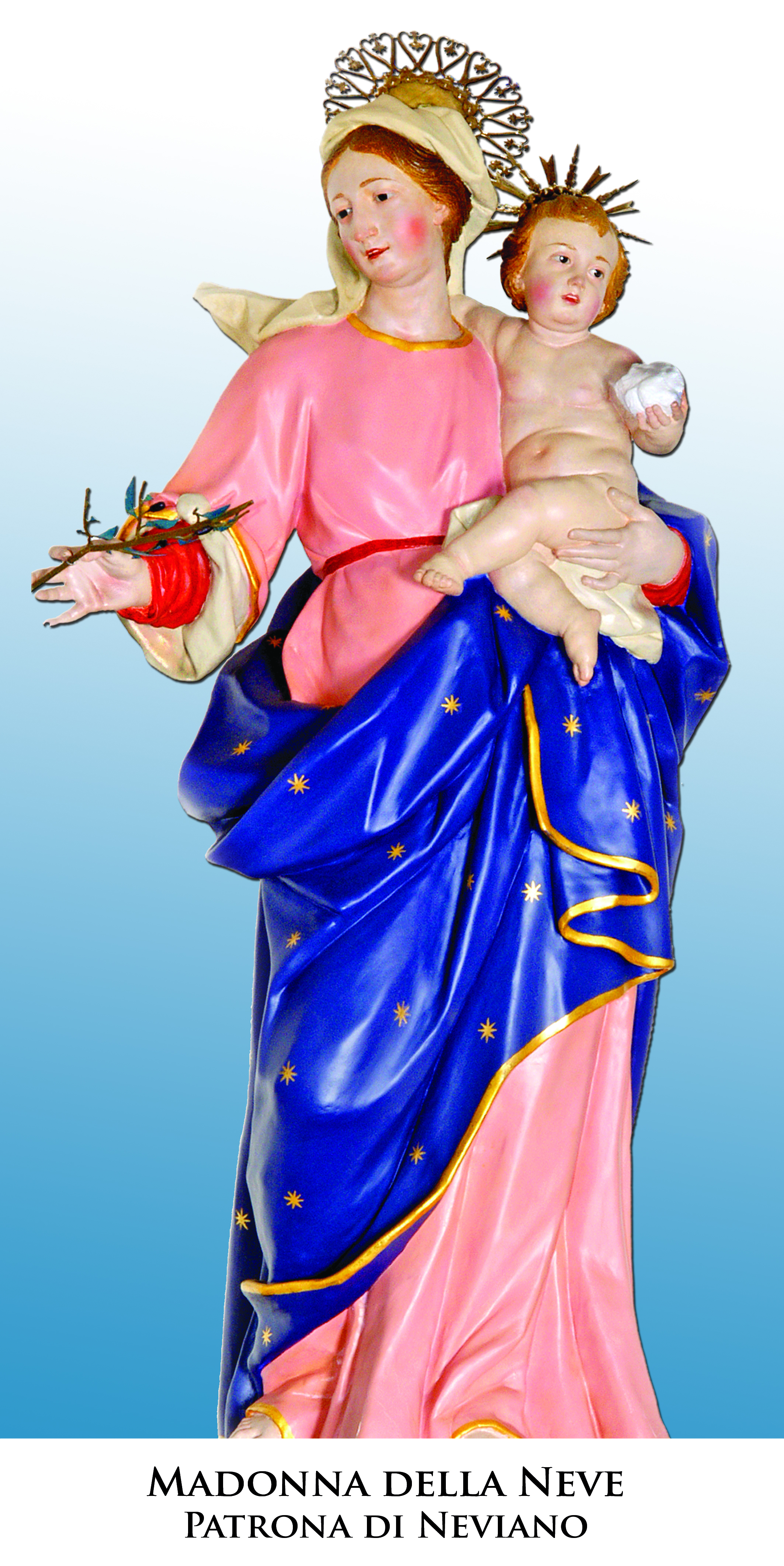 Statua della Madonna della Neve, venerata in Neviano (Lecce)